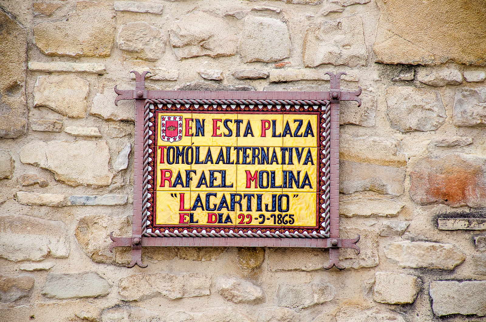 Coso taurino de San Nicasio de Úbeda. Placa conmemorativa cuando el torero Rafael Molina, "Lagartijo", tomó la alternativa en esta plaza, el día 29 de septiembre de 1865.